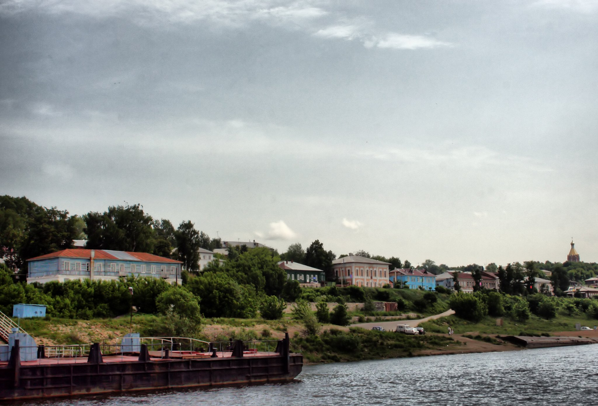 Kasimov, Ryazanskaya oblast', Russia